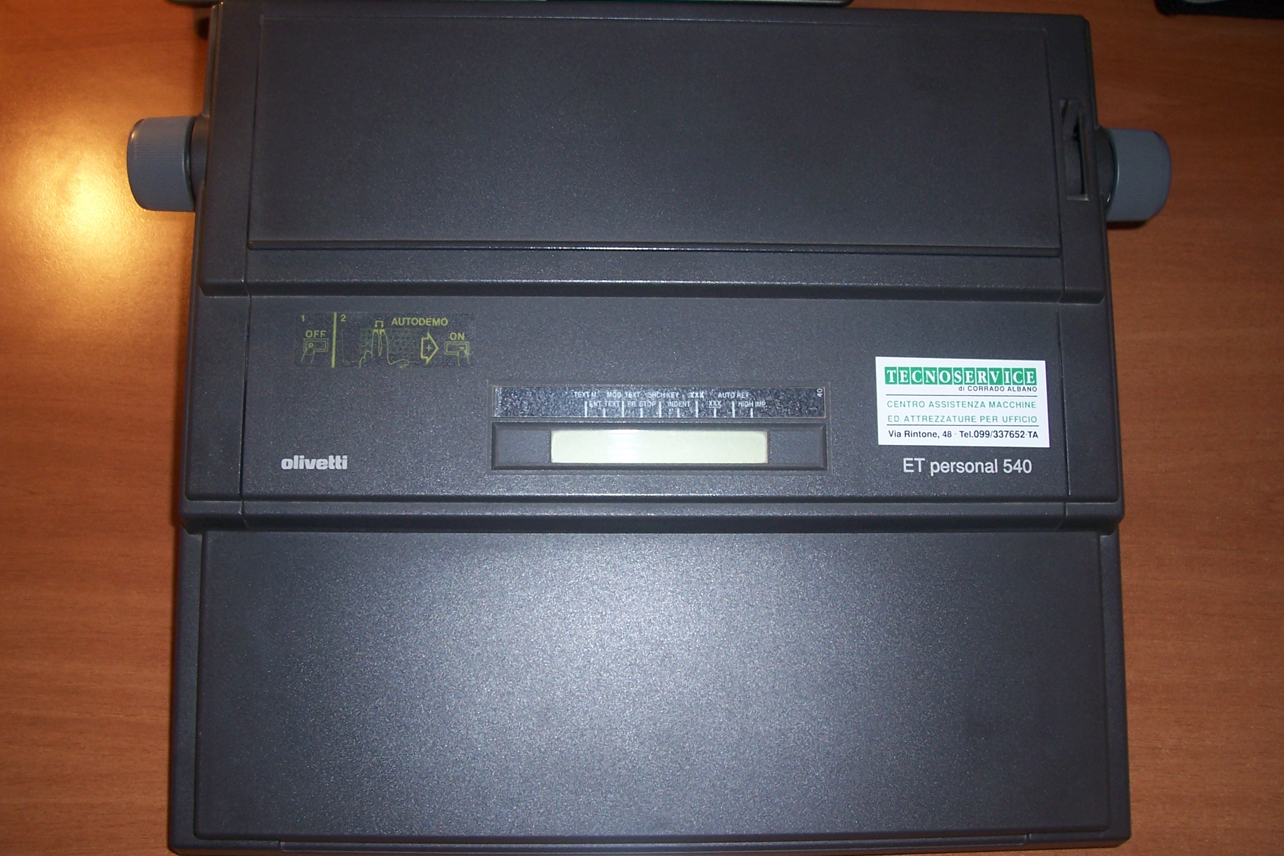 La macchina da scrivere elettronica Olivetti ET Personal 540 chiusa